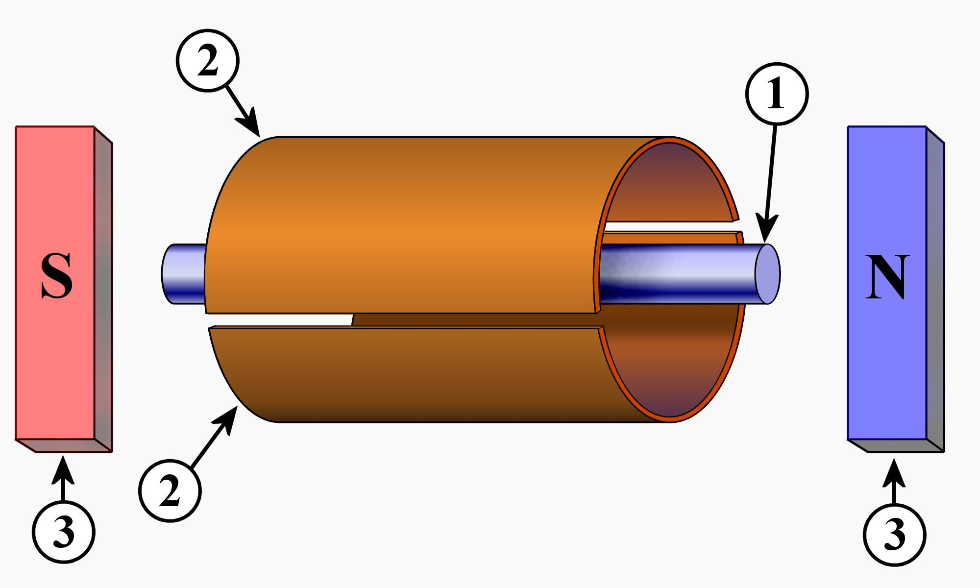 Prinzip eines Schlitzmagnetrons